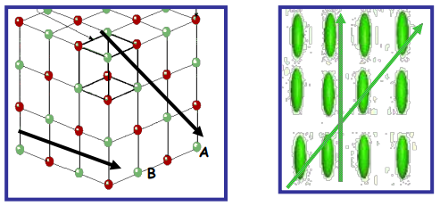 Anisotropia solido kristalinoetan